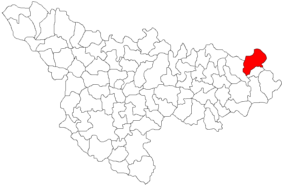 Categorie:Hărţi ale judeţului Timiş